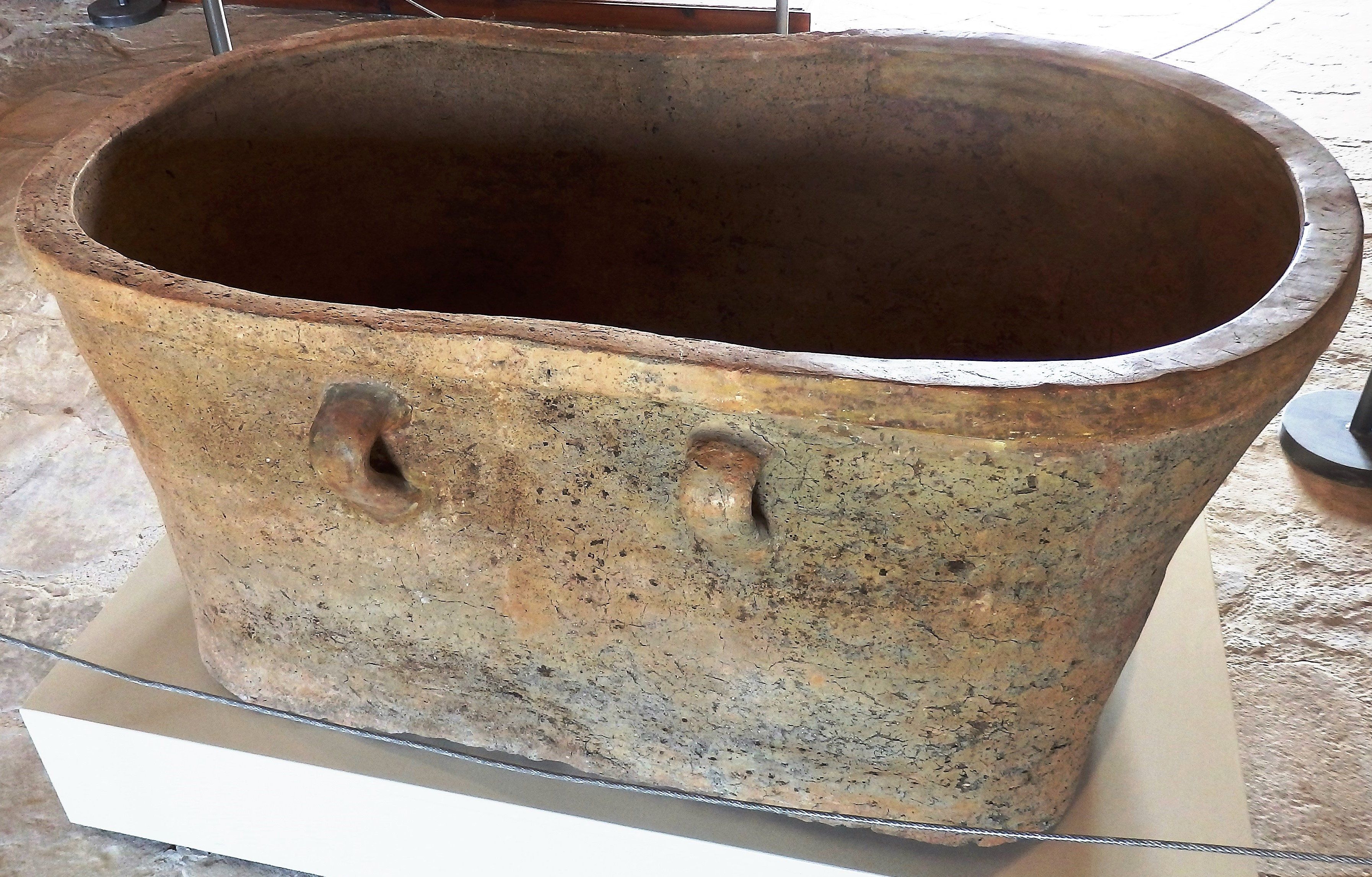 Badewanne, späte Bronzezeit (1650-1050 v. Chr.), Festungs-Museum Kouklia (Zypern)